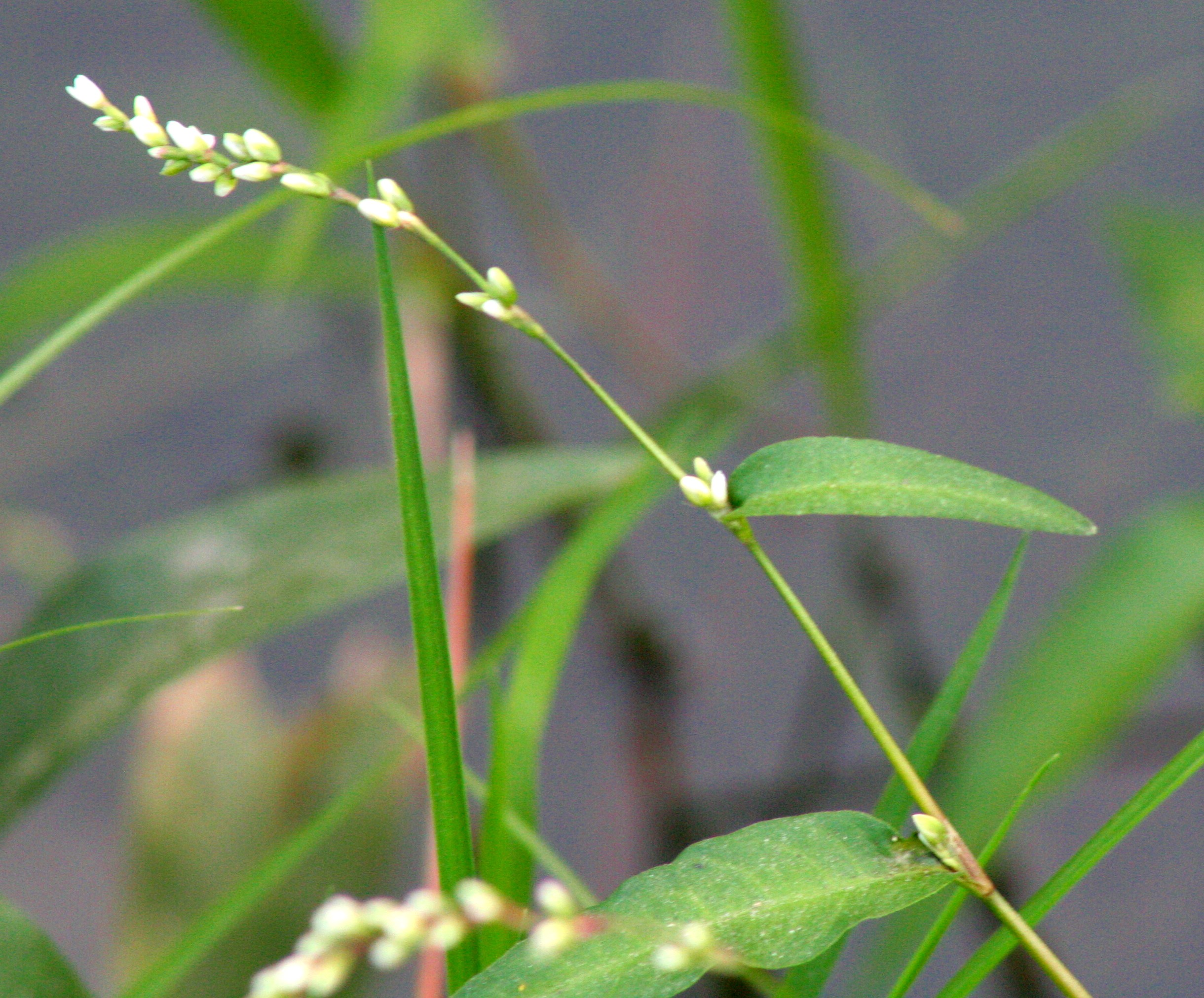 Persicaria_mitis (Polygonum mite) - Persicaria mite Località Canizzano (TV), quota 10 m s.l.m.